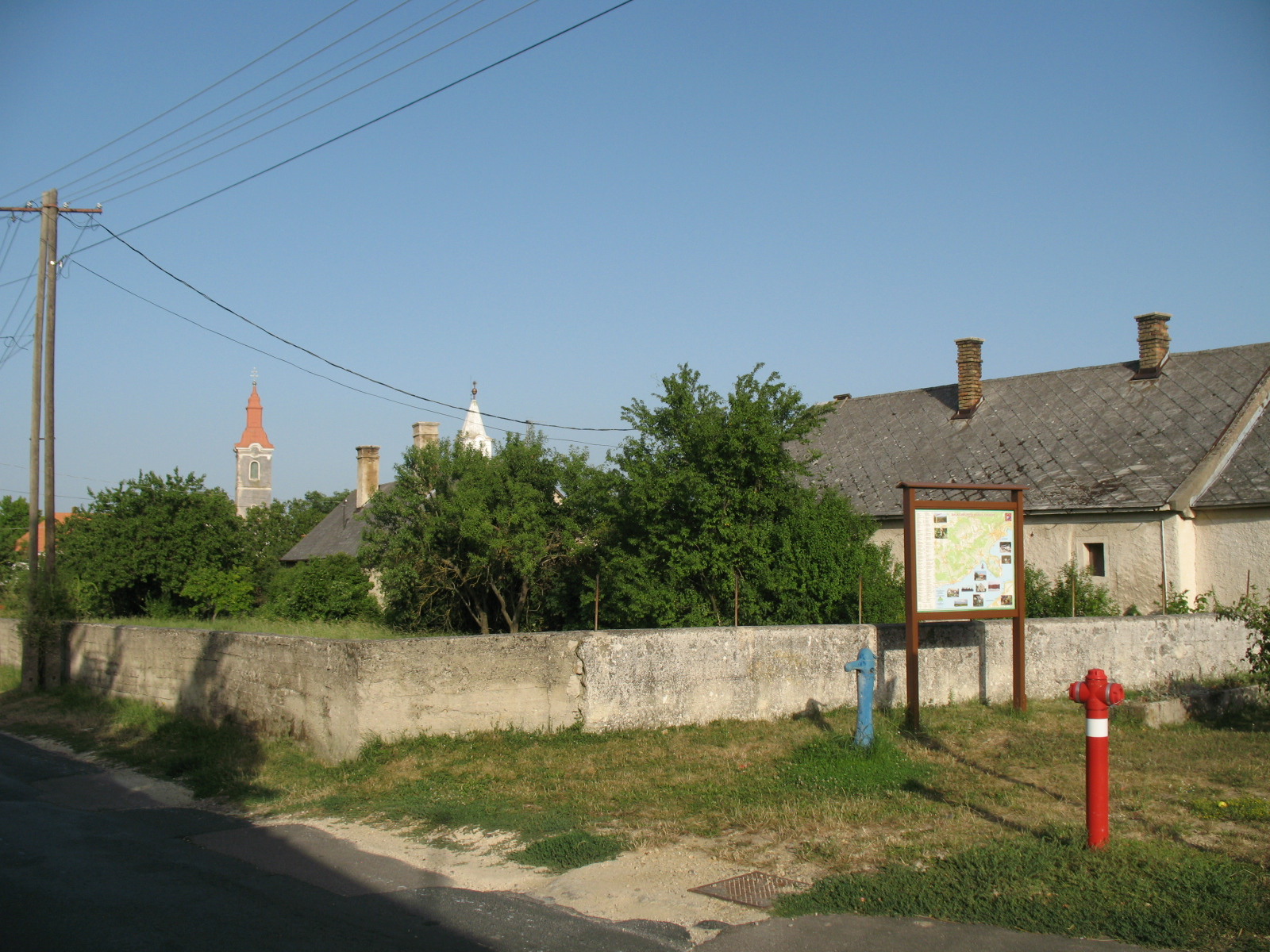 Mencshely